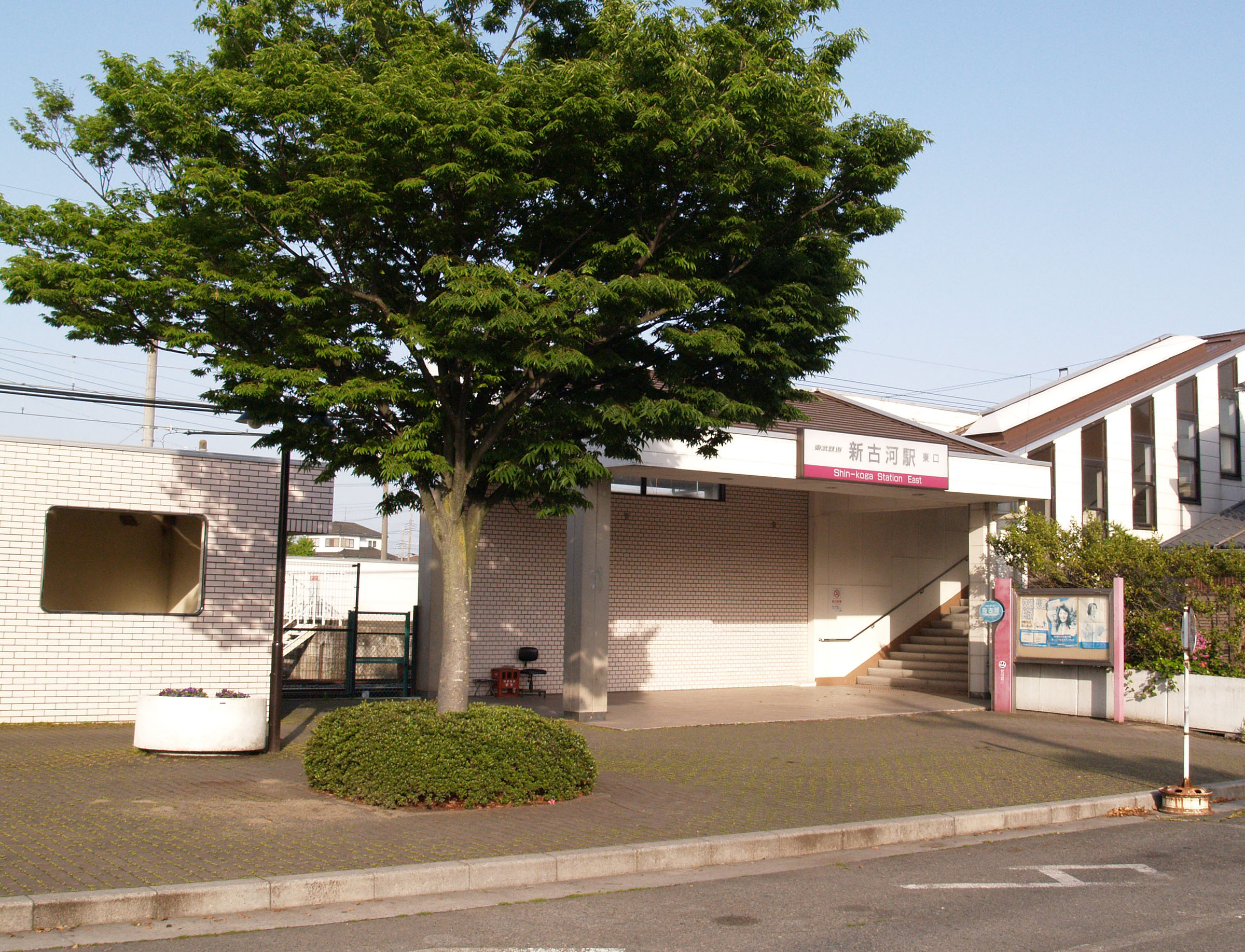 新古河駅東口